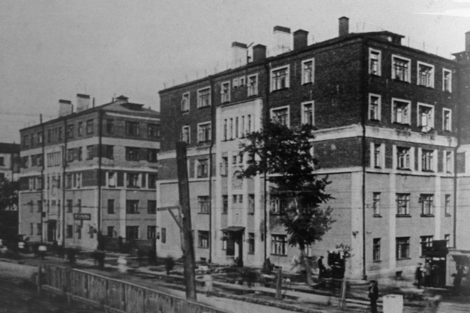 Русаковская улица, 2/1. Жилой квартал 1920-х годов в стиле конструктивизма «Жилмассив Русаковский». Арх. Улинич Б.Я. Дома постройки 1926 года, изначально трехэтажные, надстроены в 1930-х годах.